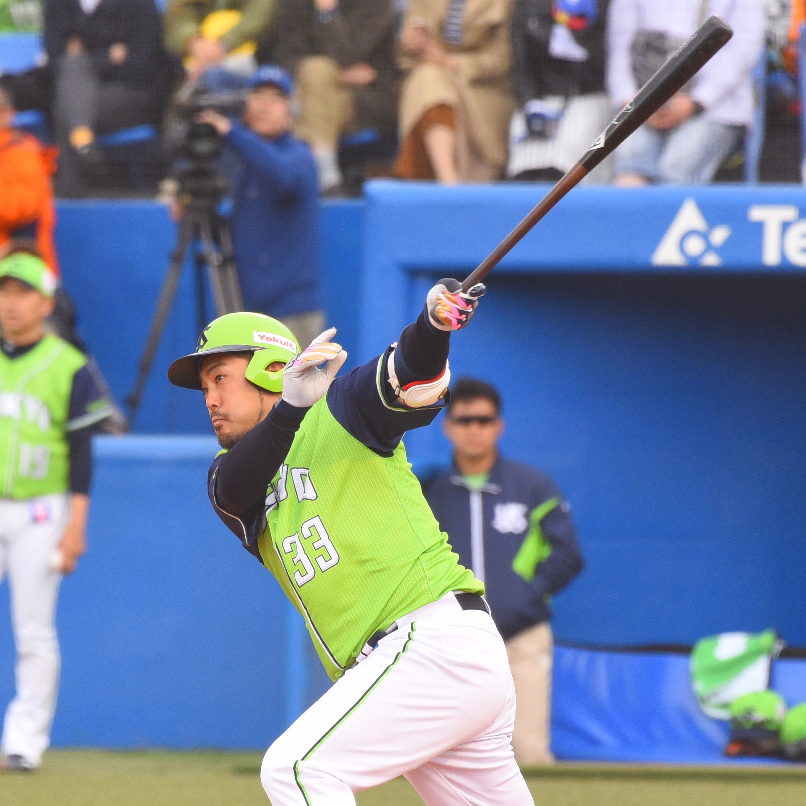 東京ヤクルトスワローズ 畠山和洋 2018年4月7日 神宮球場